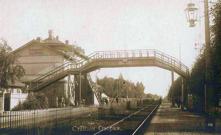 Станция Озерки Финляндской железной дороги